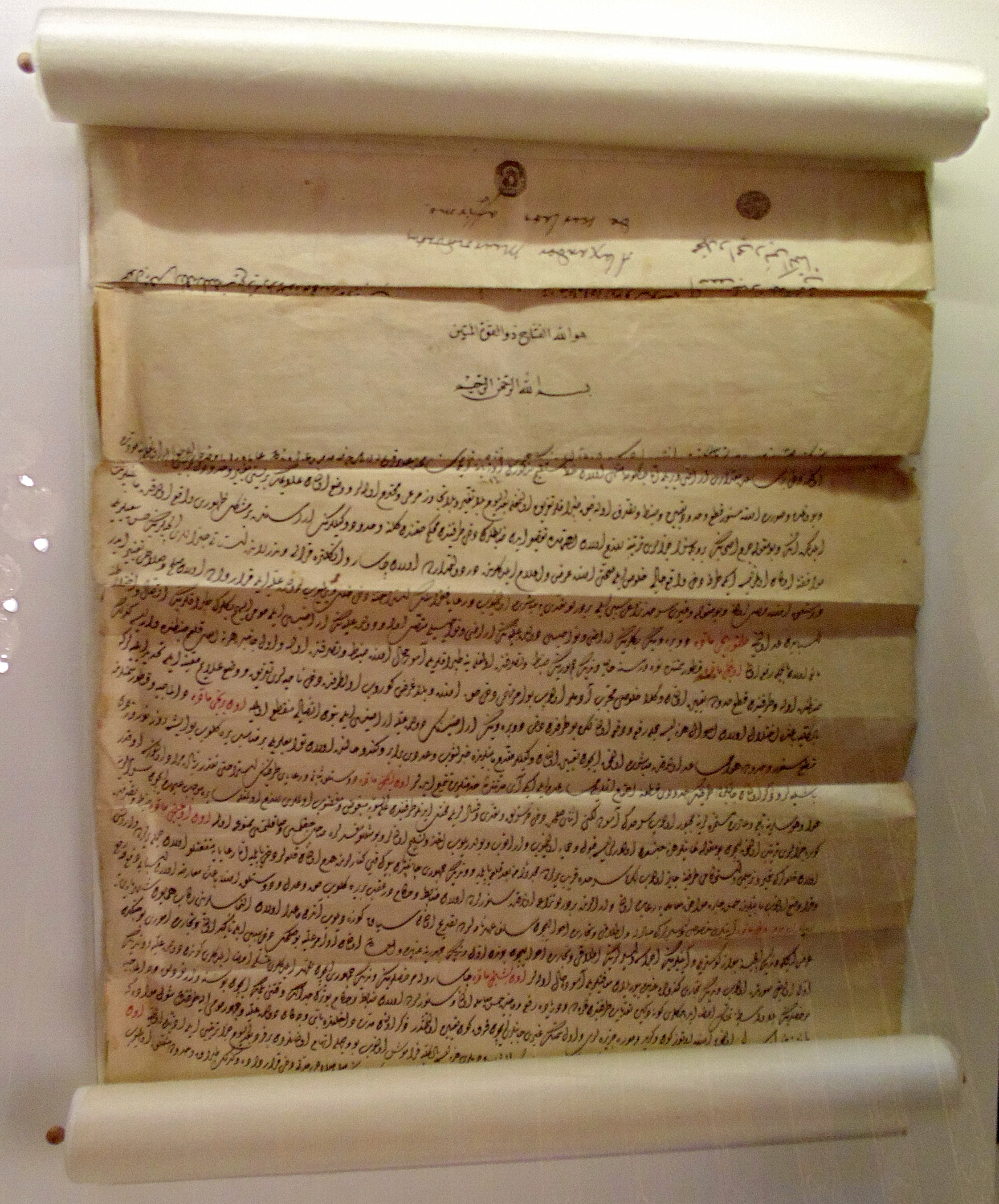 Карловицький трактат. Примірник, виставлений у венеційському Палаці дожів